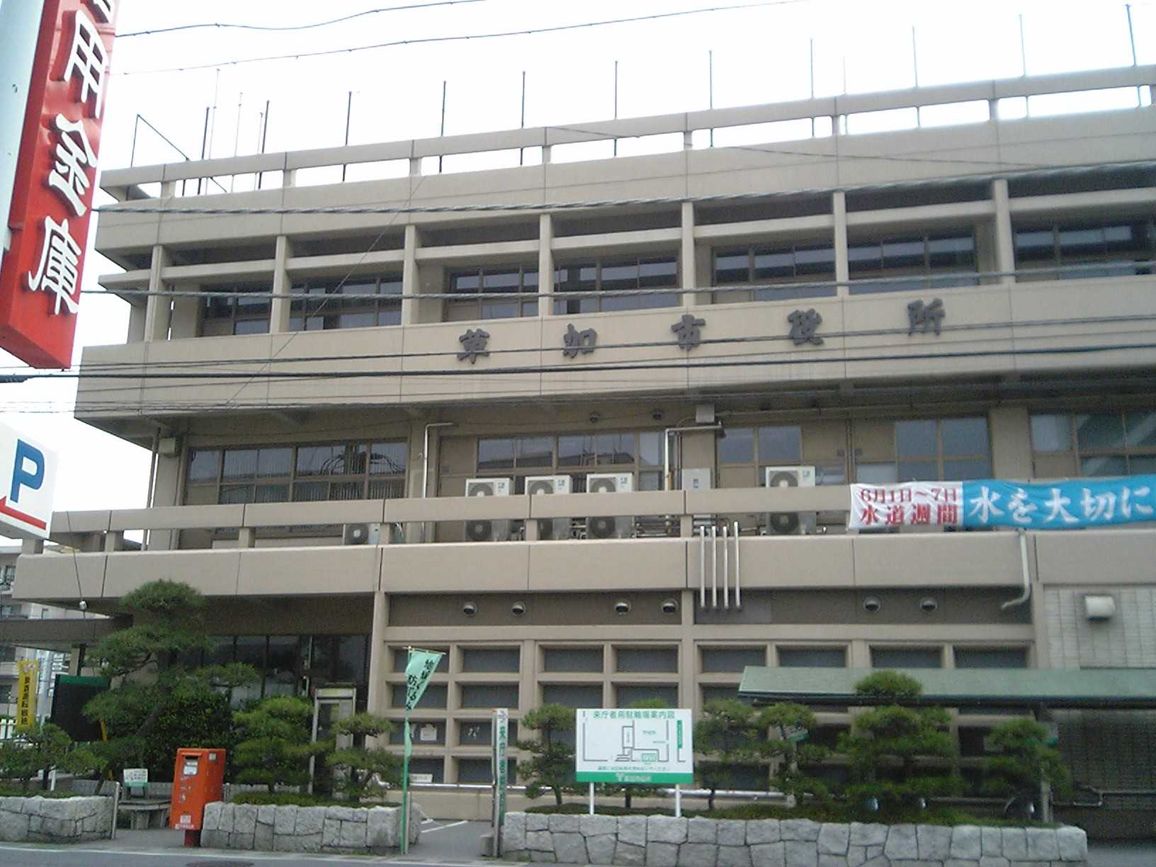 草加市役所